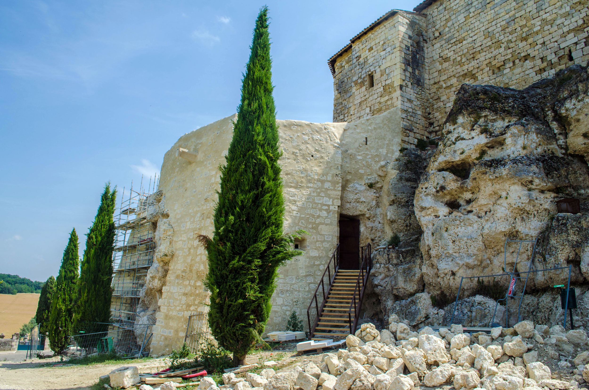 Lectoure (Gers, France), ancien château des comtes d’Armagnac, bastion nord-ouest en cours de restauration (2014)